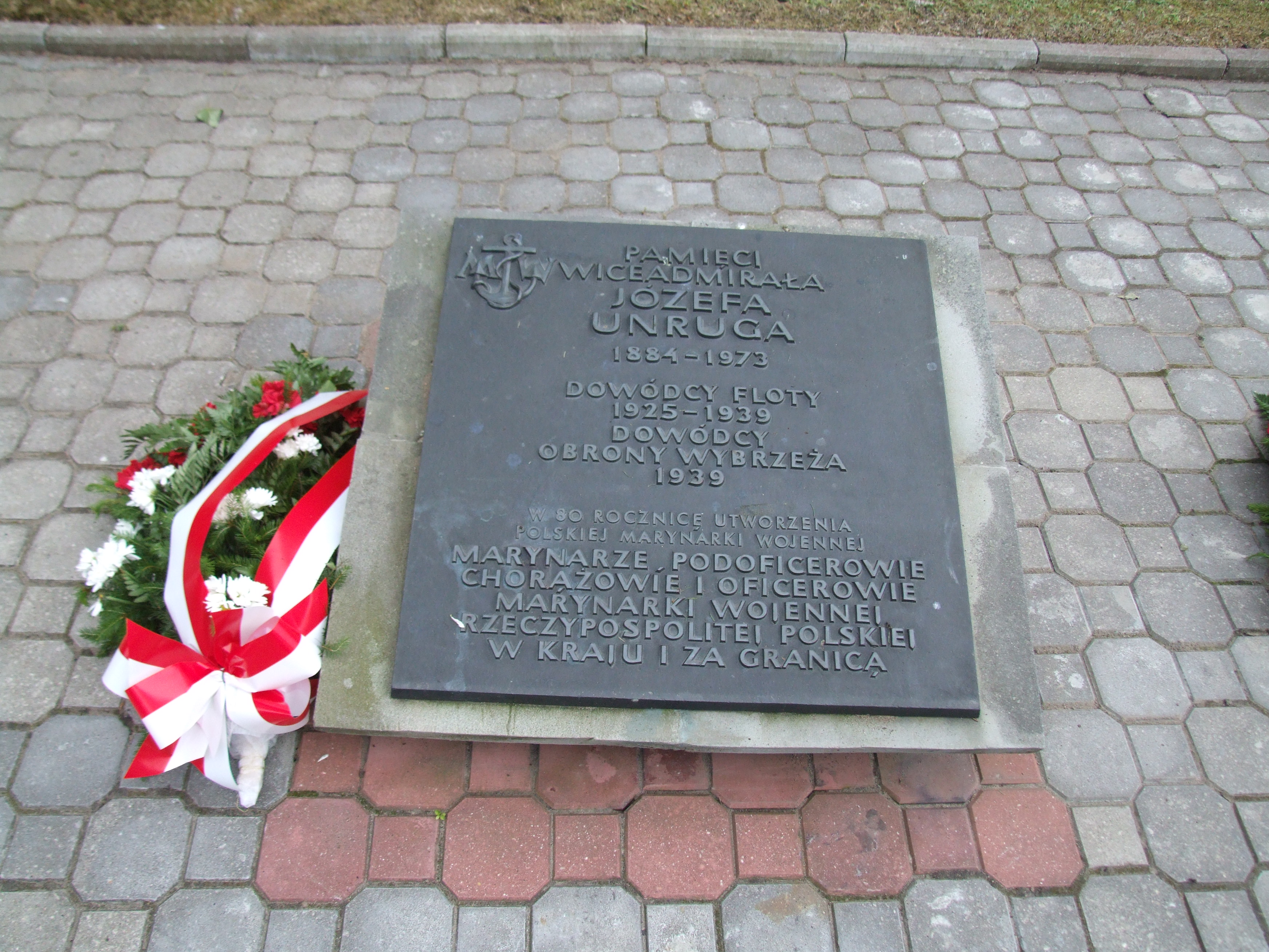 Gdynia-Oksywie Cmentarz Marynarki Wojennej